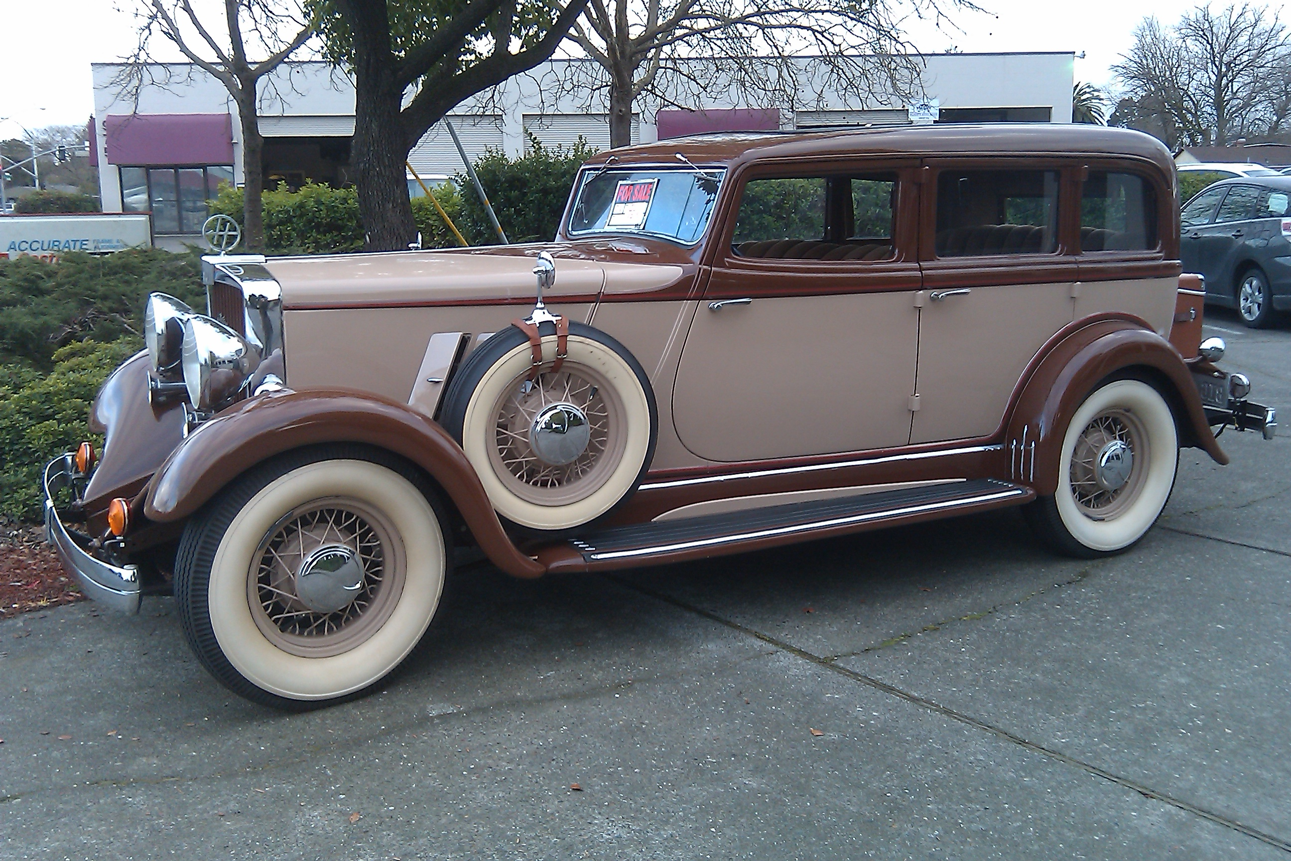 1932 Hupmobile Model F 222